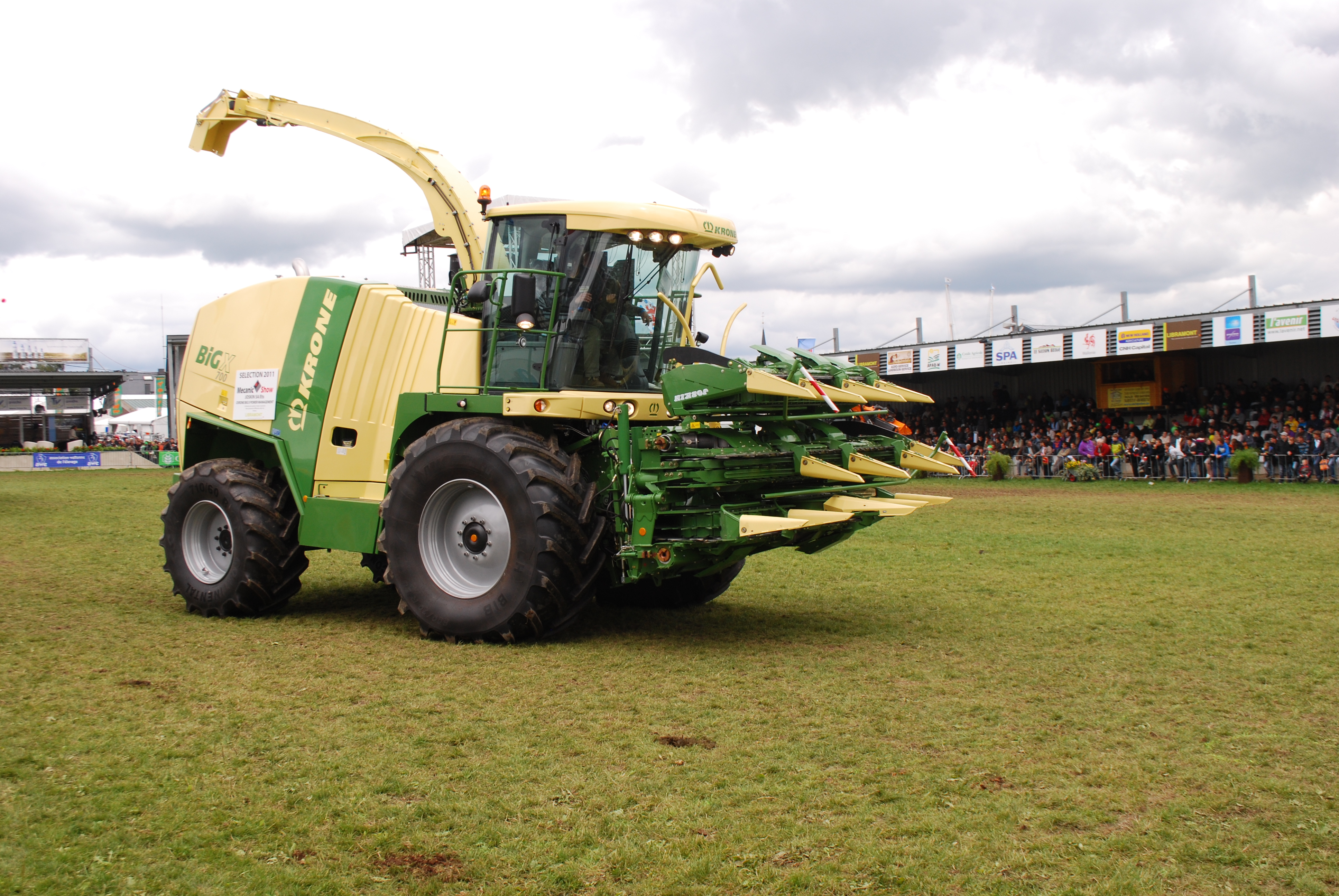 Vue de la foire agricole de Libramont, le 24 juillet 2011; Krone Big X 700.